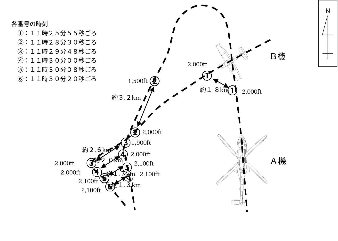 運輸安全委員会の報告書2002-8より